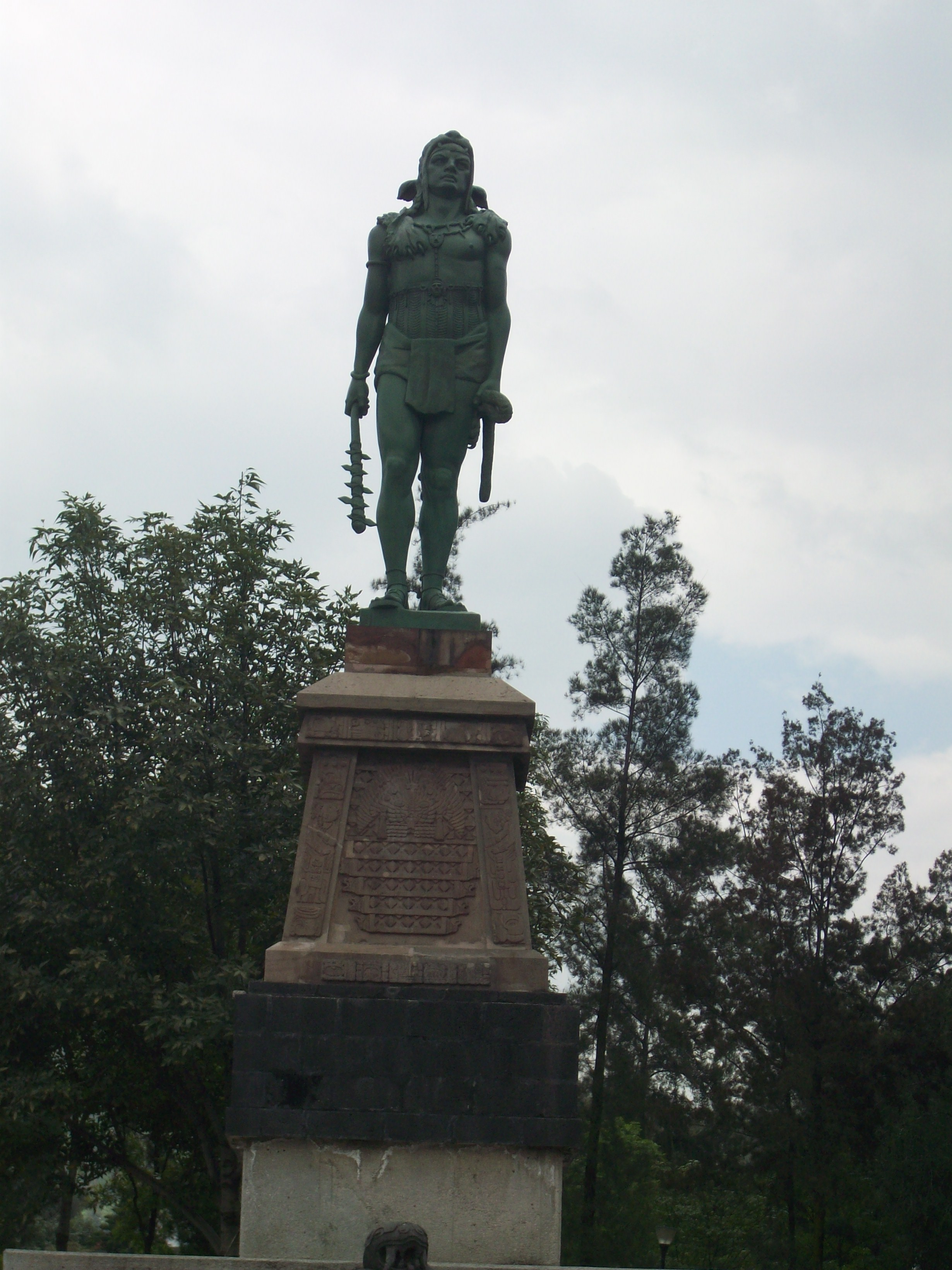 Estatua de Indios verdes en su basamento